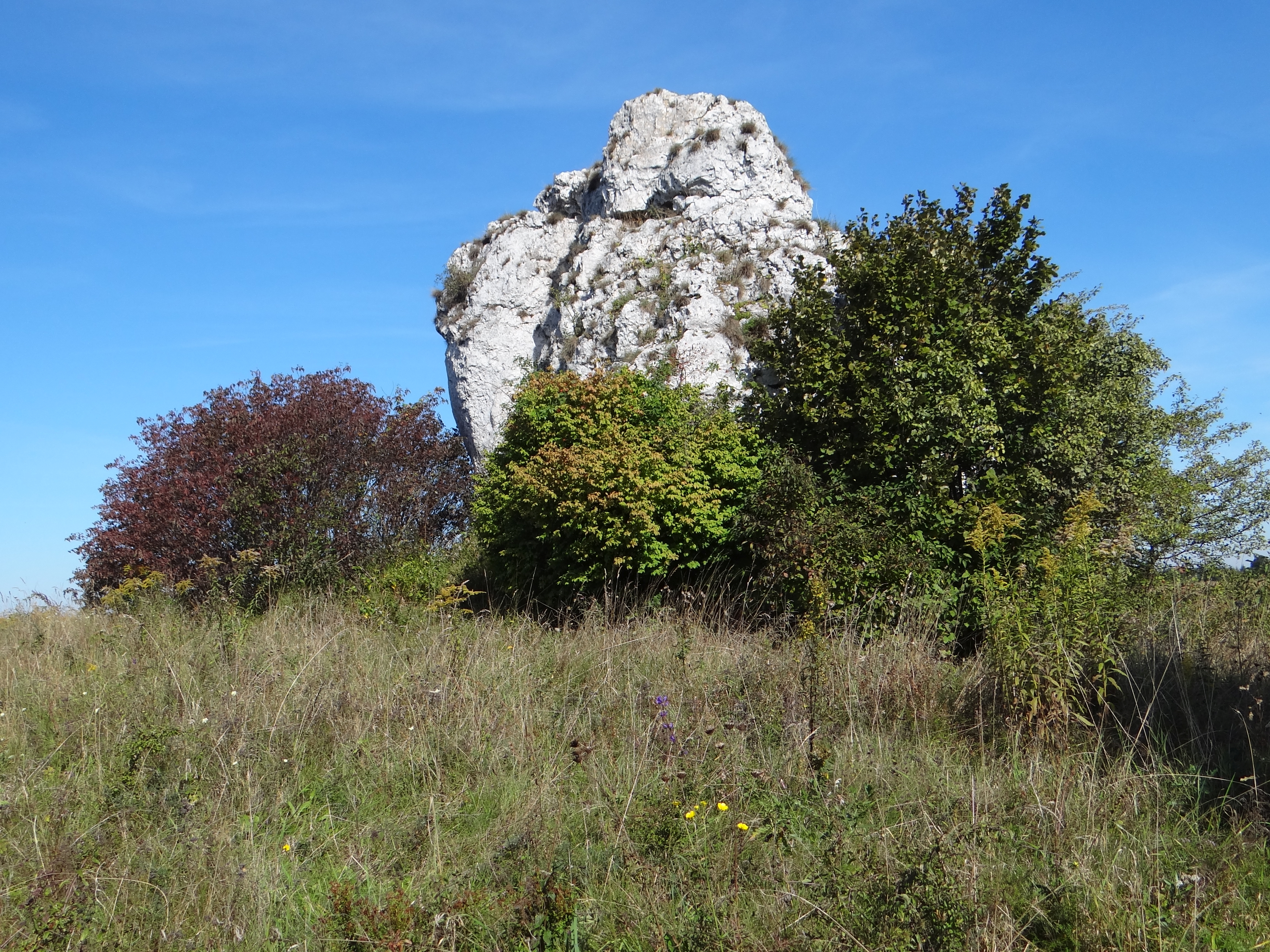 Skała Ostry Kamień w grupie skał na wzgórzu 502 w Jerzmanowicach